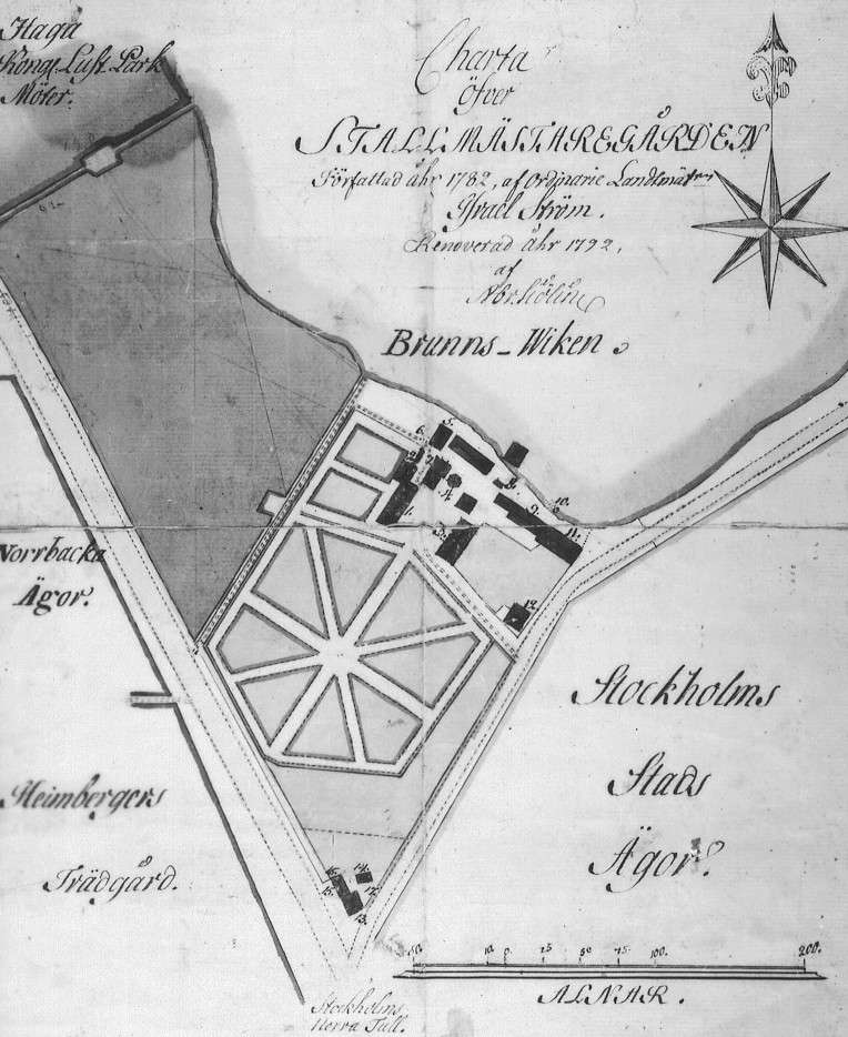 karta över Stallmästaregården